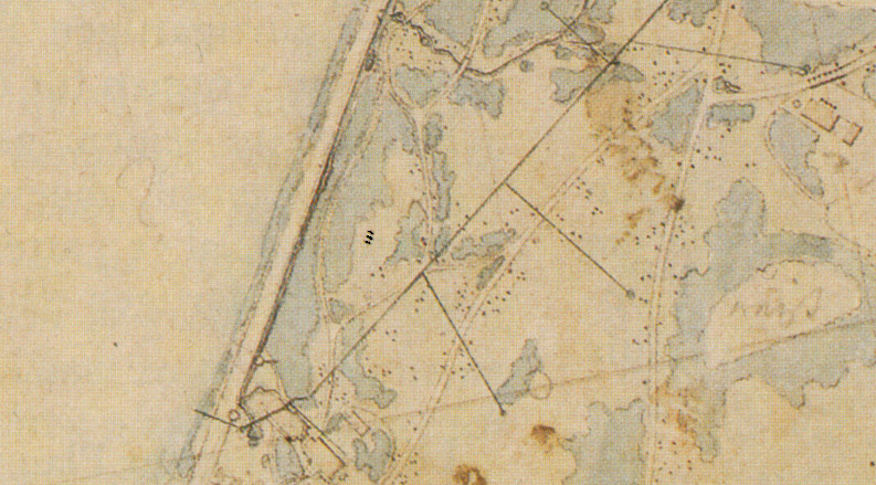 Der Geschützplatz, Ausschnitt aus der Meyer-Druckvorlage 1845